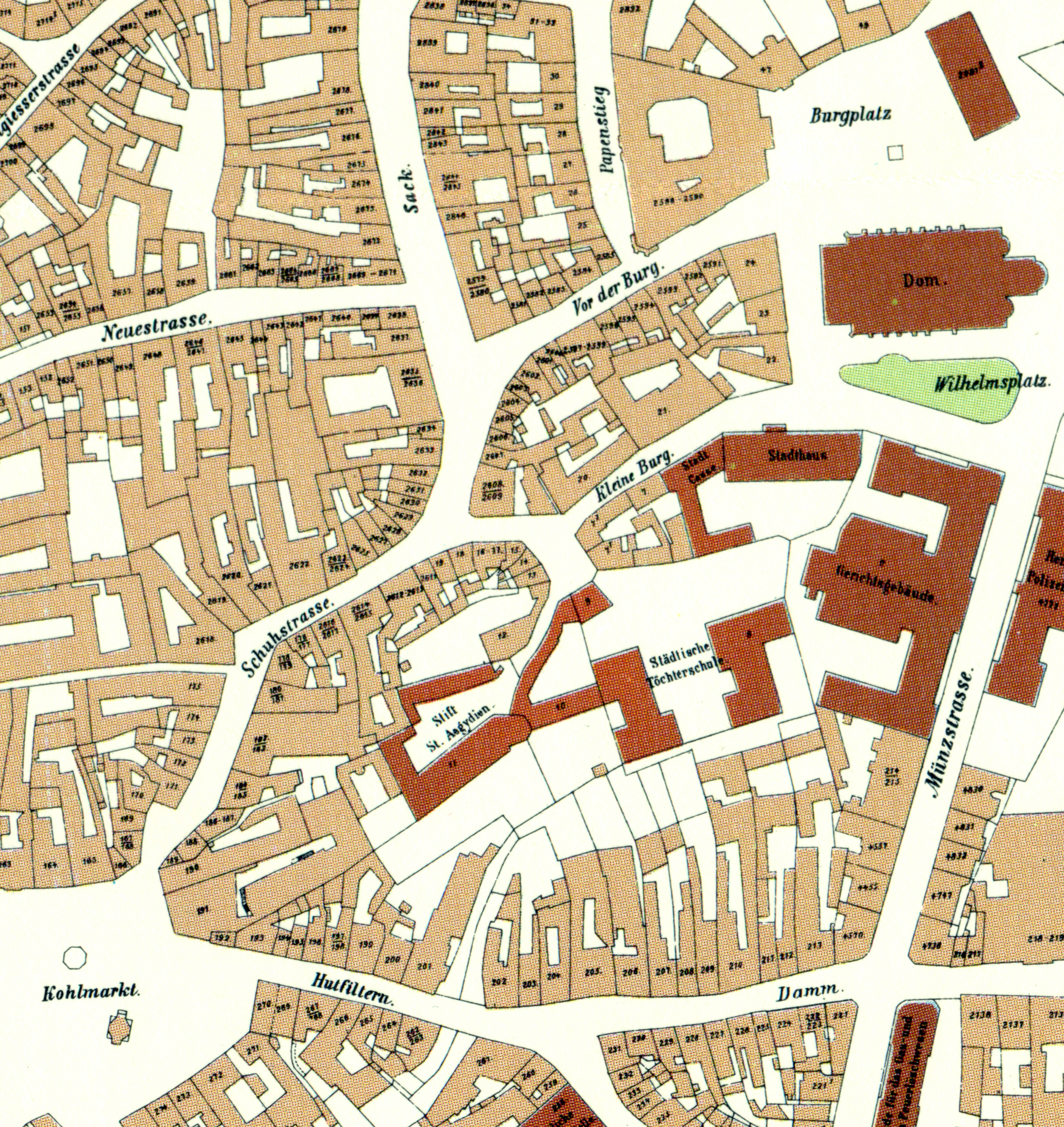 Ausschnitt aus: Karte des innerhalb der Umflutgräben belegenen Theiles der Stadt Braunschweig (1885) Der Gebäudekomplex der Maria-Magdalenen-Kapelle und der an sie angrenzenden Wirtschafts- und Wohngebäude befindet sich etwas links der Mitte in dem rotbraunen Bereich mit der Beschriftung Stift St. Aegydien.